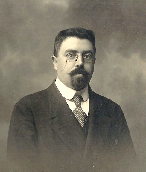 Vittorio Meichsner de Meichsenau a Fiume